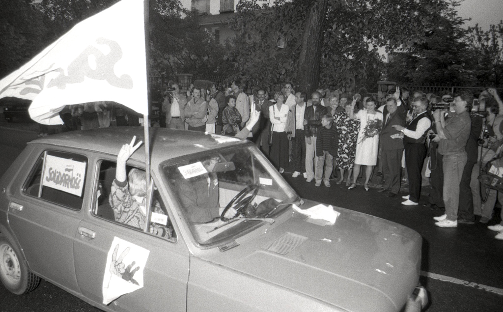 Rajd samochodowy zorganizowany na zakończenie kampanii wyborczej NSZZ „Solidarność”.